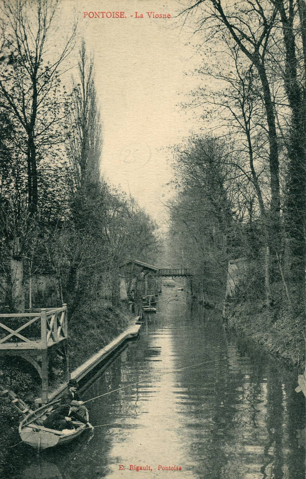 Carte postale ancienne éditée par Rigault PONTOISE : La Viosne